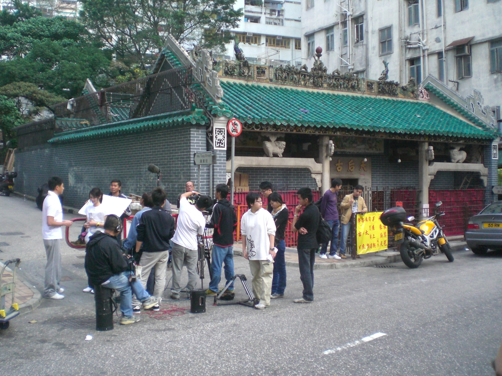 筲箕灣, 筲箕灣東大街, 筲箕灣天后廟 Tin Hau Temple, Shau Kei Wan Main Street East, Hong Kong